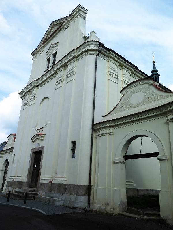 Kostel Narození Panny Marie, Farní, Kostelní, st. 42, 45, 47, Toužim.